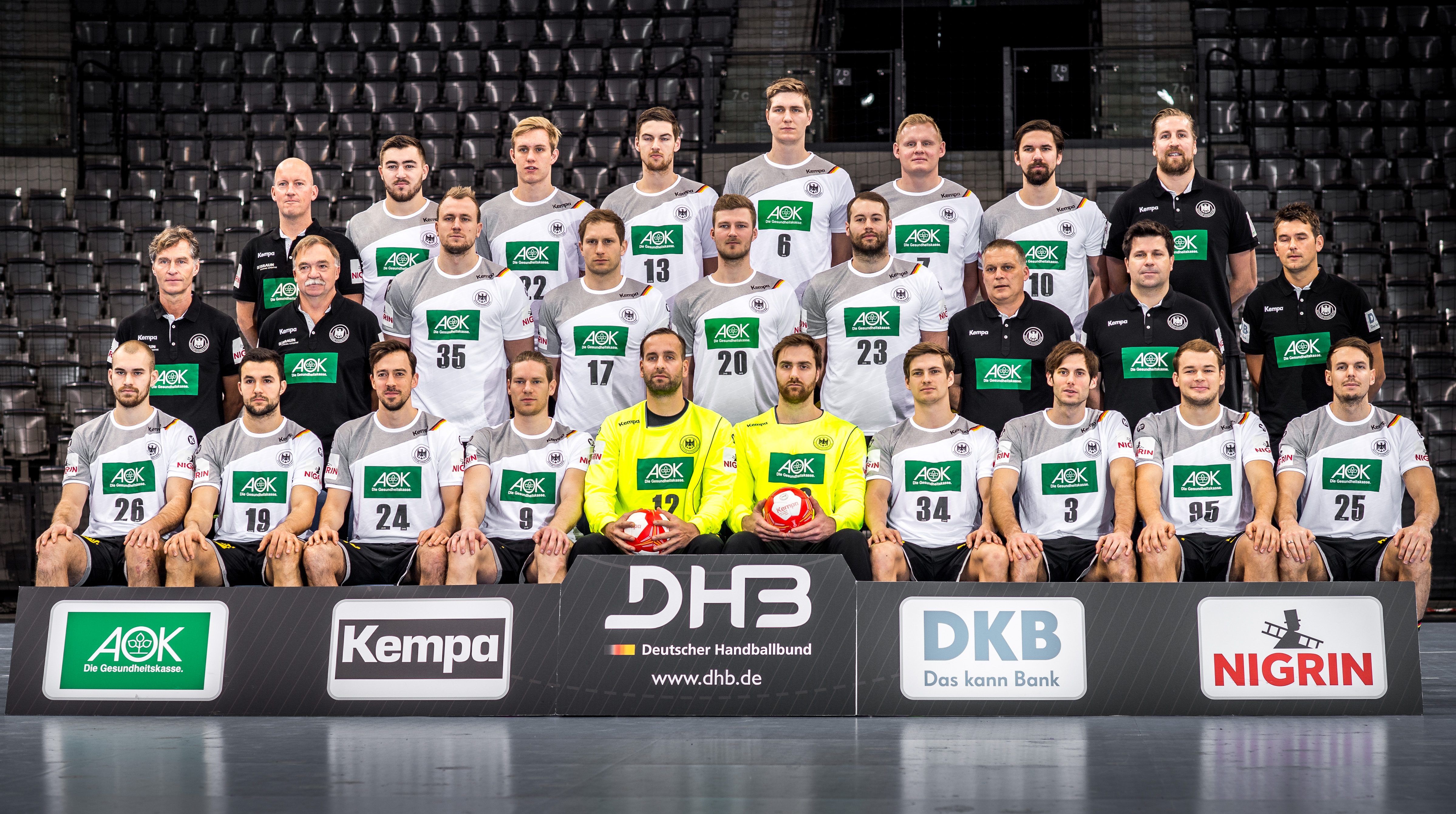 Mannschaftsfoto beim Pressetermin der Deutschen Handballnationalmannschaft am 4. Januar 2018 in der Porsche-Arena in Stuttgart Oben von links: Physiotherapeut Dennis Finke, Jannik Kohlbacher, Marian Michalczik, Hendrik Pekeler, Finn Lemke, Patrick Wiencek, Fabian Wiede, Teammanager Oliver Roggisch Mitte von links: Physiotherapeut Peter Gräschus, Mannschaftsarzt Dr. Kurt Steuer, Julius Kühn, Steffen Weinhold, Philipp Weber, Steffen Fäth, Teambetreuer Volker Schurr, Co-Trainer Alexander Haase, Bundestrainer Christian Prokop Unten von links: Maximilian Janke, Bastian Roscheck, Patrick Groetzki, Tobias Reichmann, Silvio Heinevetter, Andreas Wolff, Rune Dahmke, Uwe Gensheimer, Paul Drux, Kai Häfner